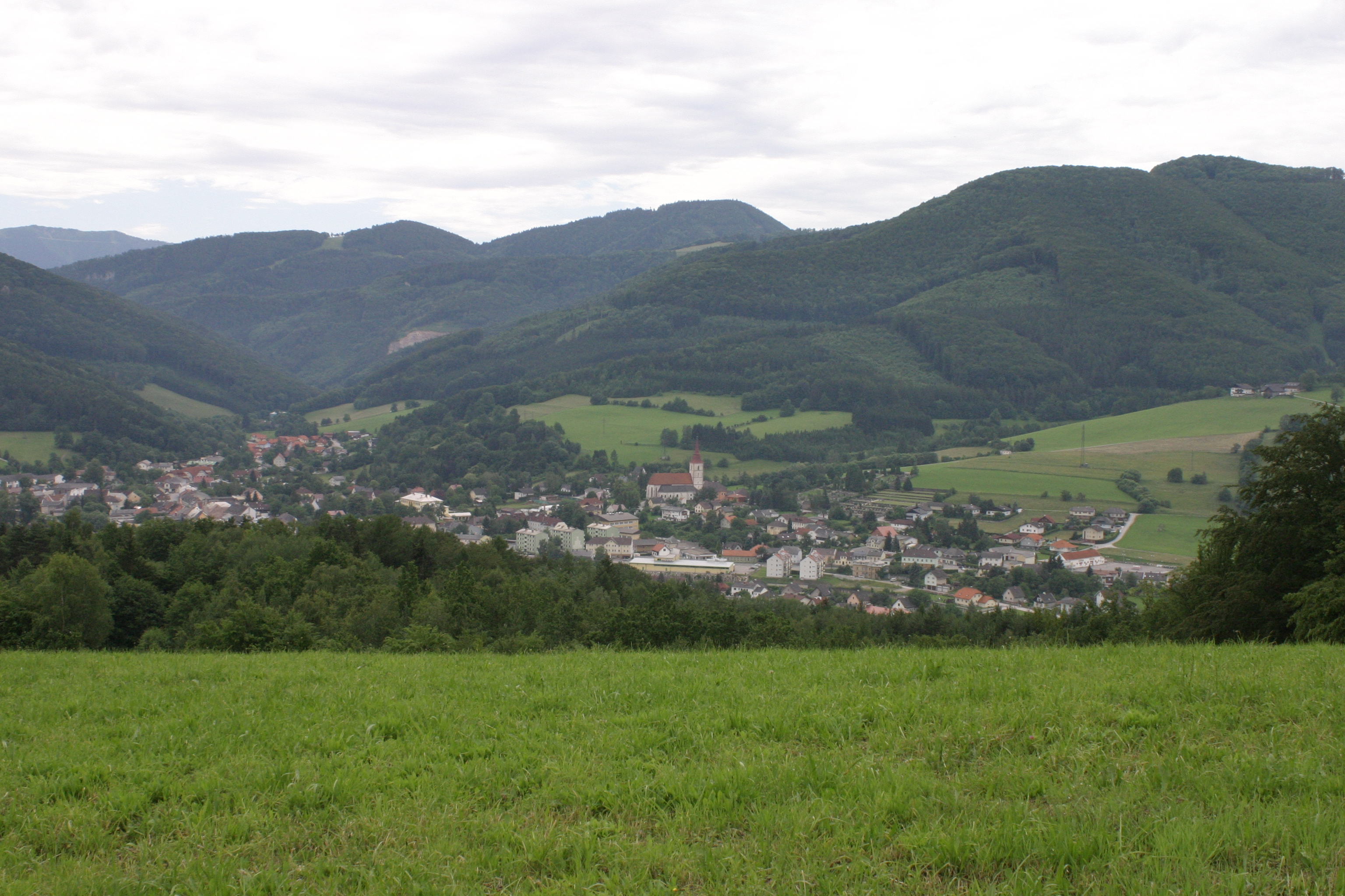 Hainfeld, Niederösterreich